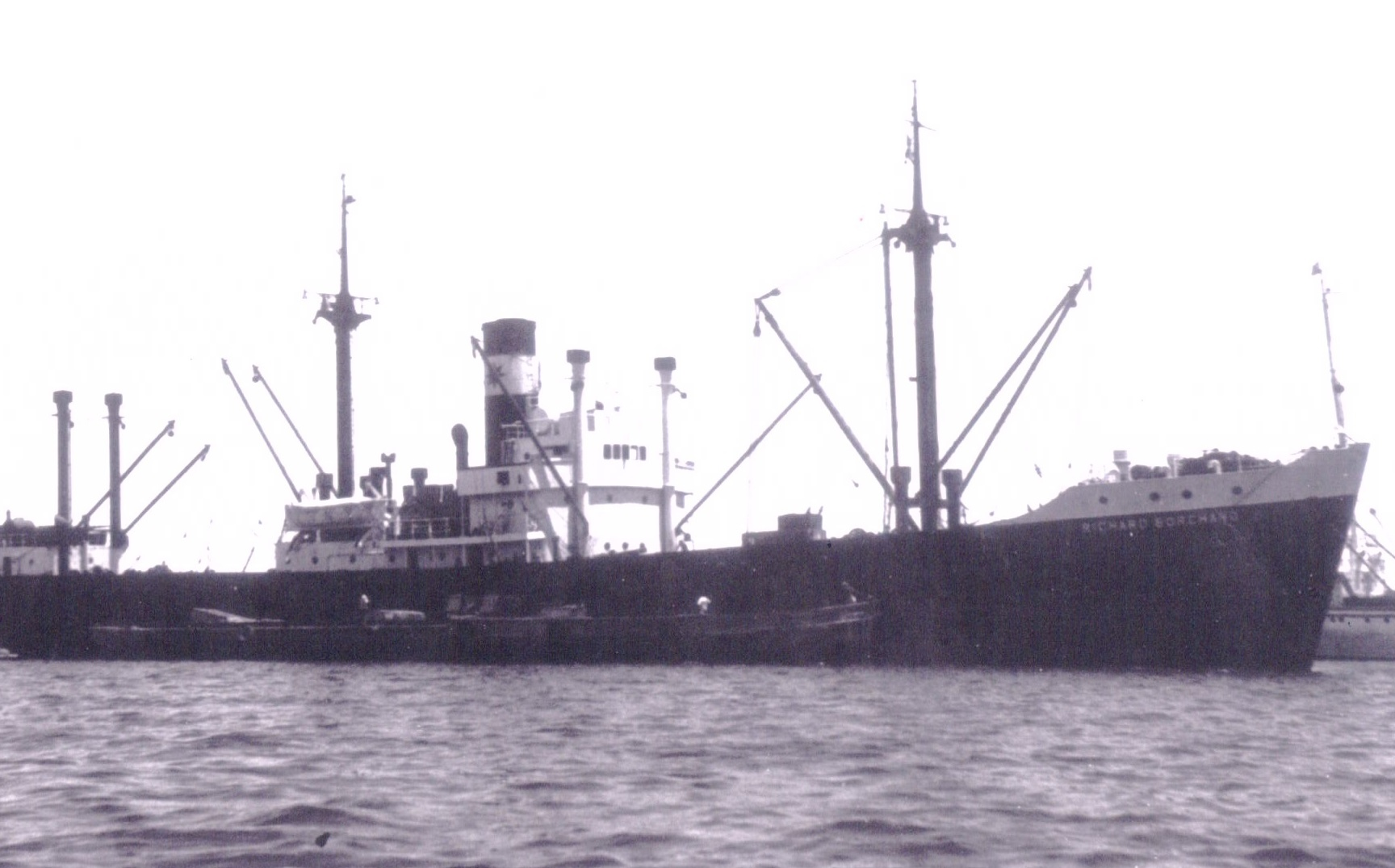 האניה ריכרד בורכרד של חברת עתיד